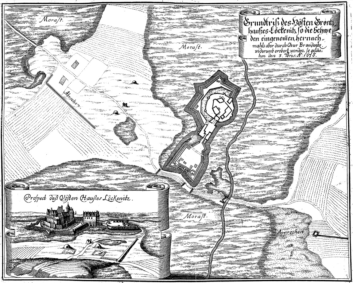 Grundtriß des Vösten Grentzhaußes Löckenitz „So die Schweden eingenomen hernachmahls aber durch Chur Brandenburg widerumb erobert worde. So geschehen dort 3. Febris A° 1676“